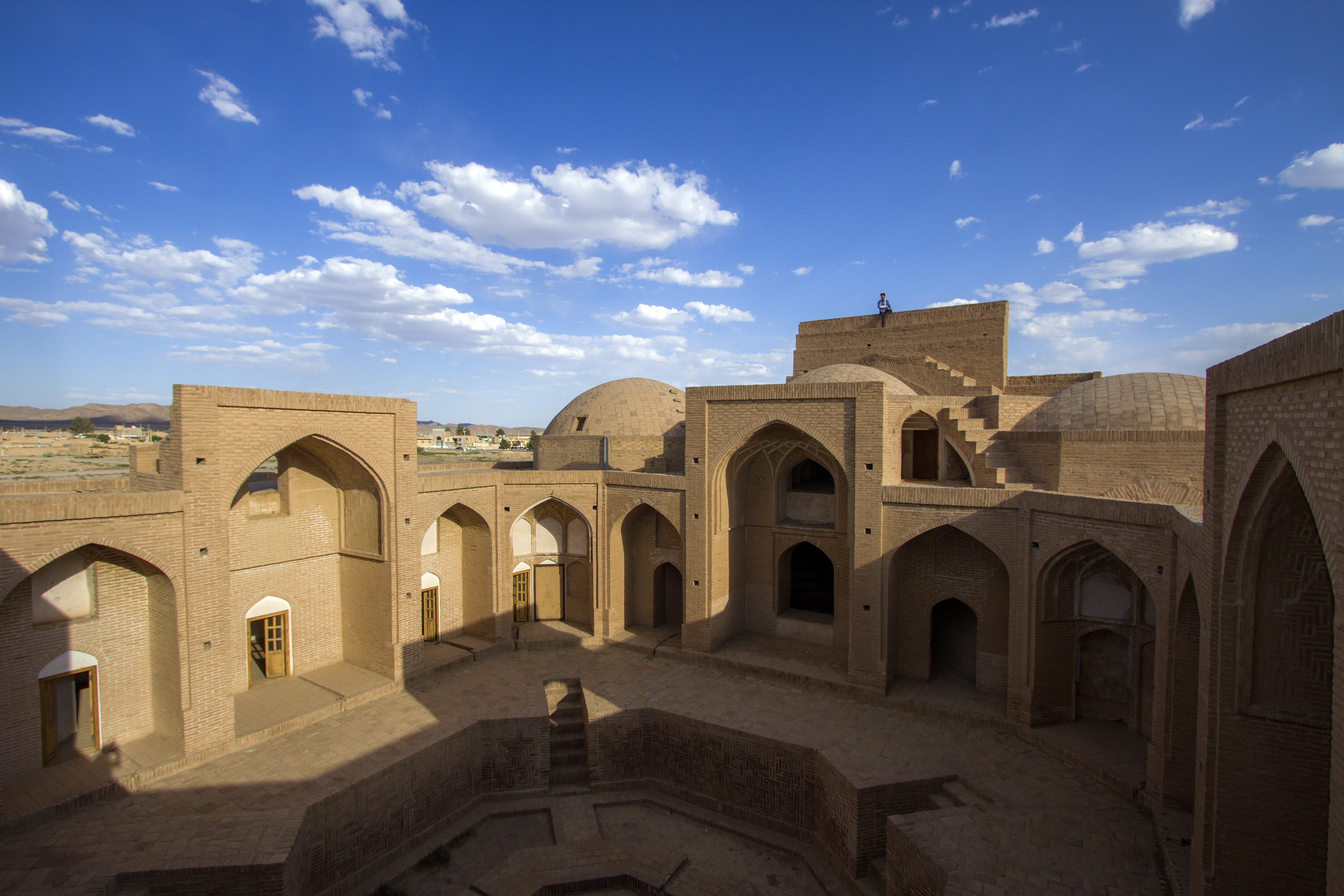 مدرسه علیا فردوس مربوط به سدهٔ ۱۰ ه.ق است و در جنوب شرق فردوس، محوطه تون واقع شده و این اثر در تاریخ ۱۴ بهمن ۱۳۵۵ با شمارهٔ ثبت ۱۳۲۱ به‌عنوان یکی از آثار ملی ایران به ثبت رسیده است.